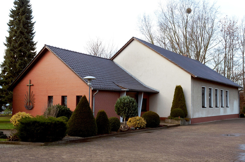 Neuapostolische Kirche Elze, Gemeinde Leinetal